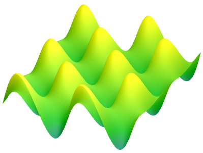 中文（中国大陆）: 函数f(x,y)= sin(x)*cos(y) 的图像